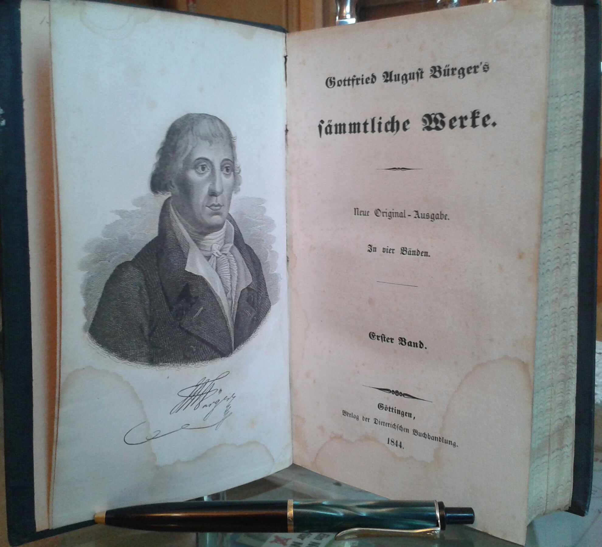 Titelseite samt Frontispiz von Bürgers sämmtlichen (sic!) Werken in vier Bänden aus dem Jahre 1844. Dieterichsche Verlagsbuchhandlung Göttingen.